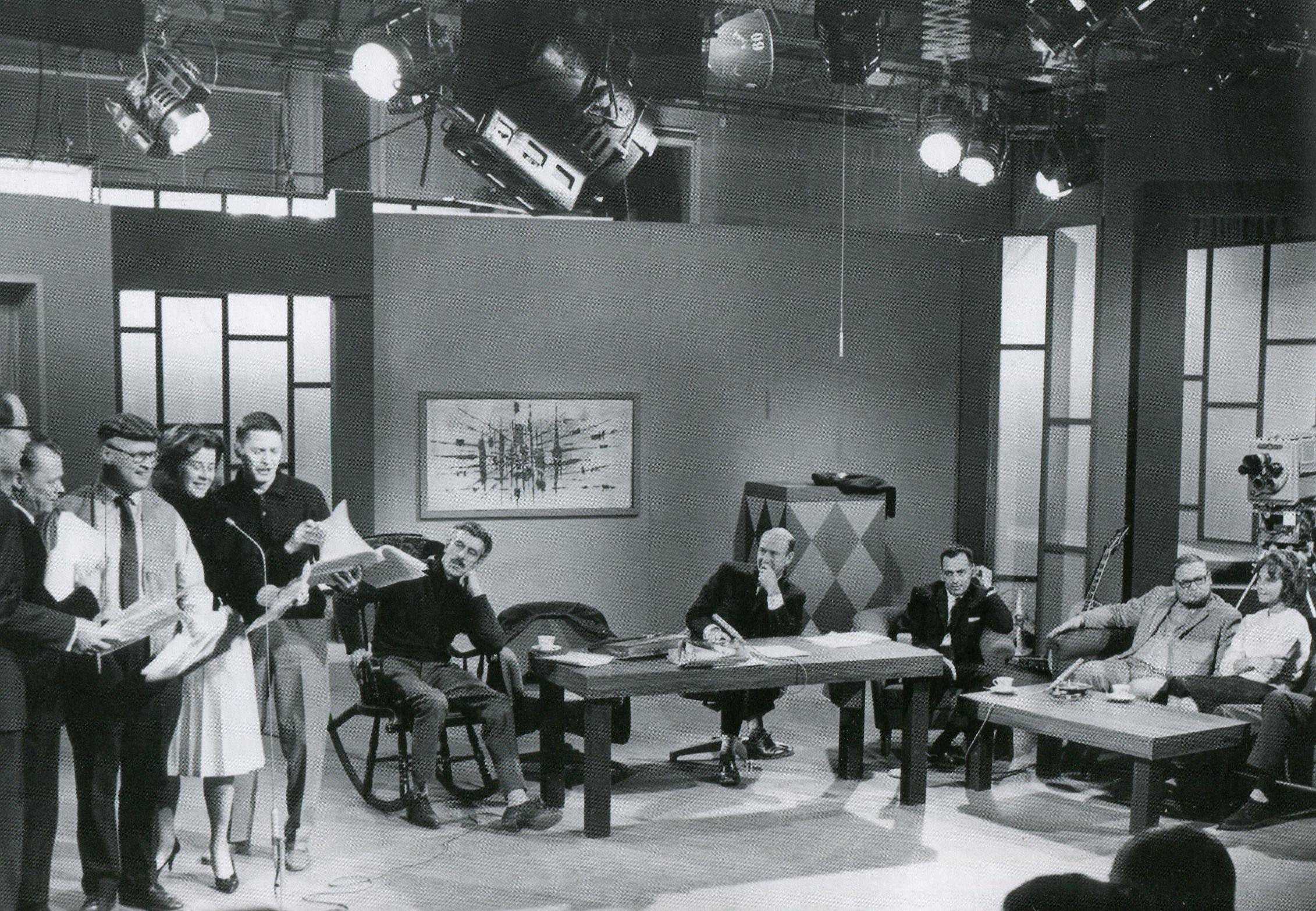 Hylands Hörna med bl.a. Povel Ramel och Brita Borg (stående i sånggruppen t v), Martin Ljung (sittande i gungstol), Lennart Hyland själv (mitt bakom det stora bordet) samt Yngve Gamlin och Gunwer Bergkvist (sittande i soffan längst t h).